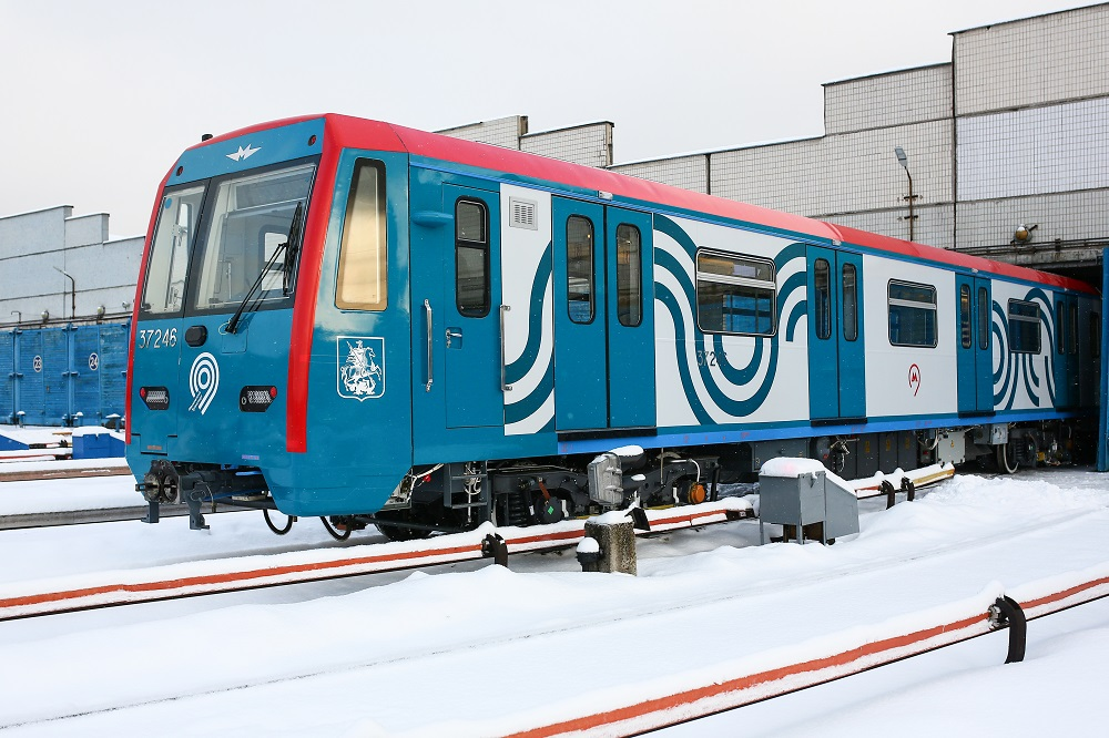 Электровагон метро 81-760 № 37246 в ливрее Московского транспорта15:04, 26 января 2015